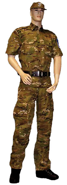 Umundurowanie ćwiczebne letnie ABW z koszulo-bluzą